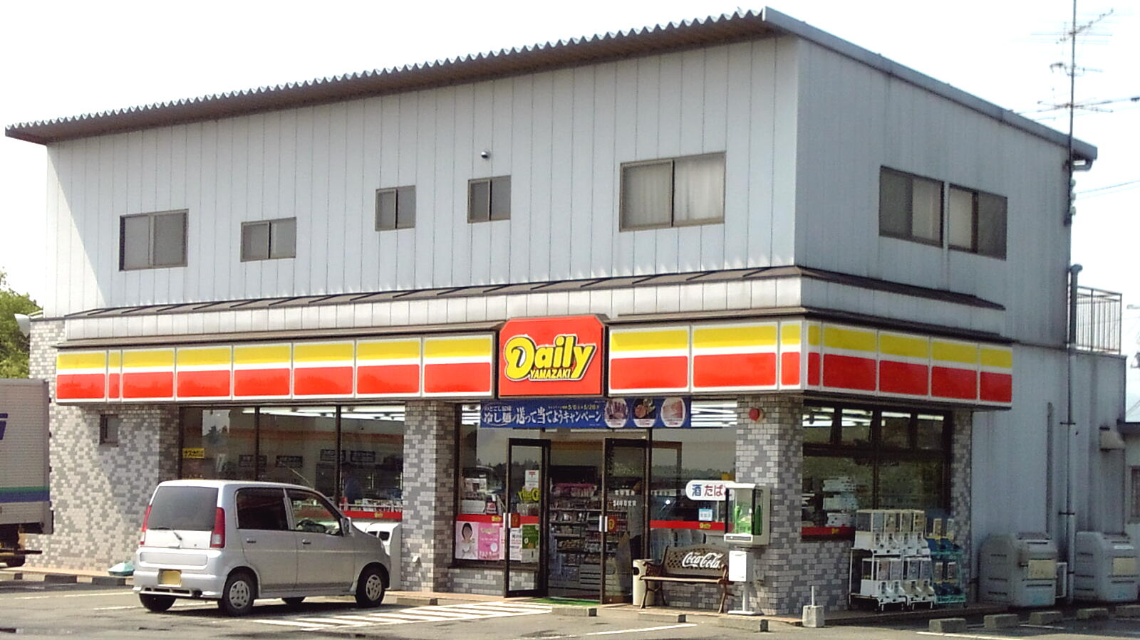 デイリーヤマザキ原町北長野店